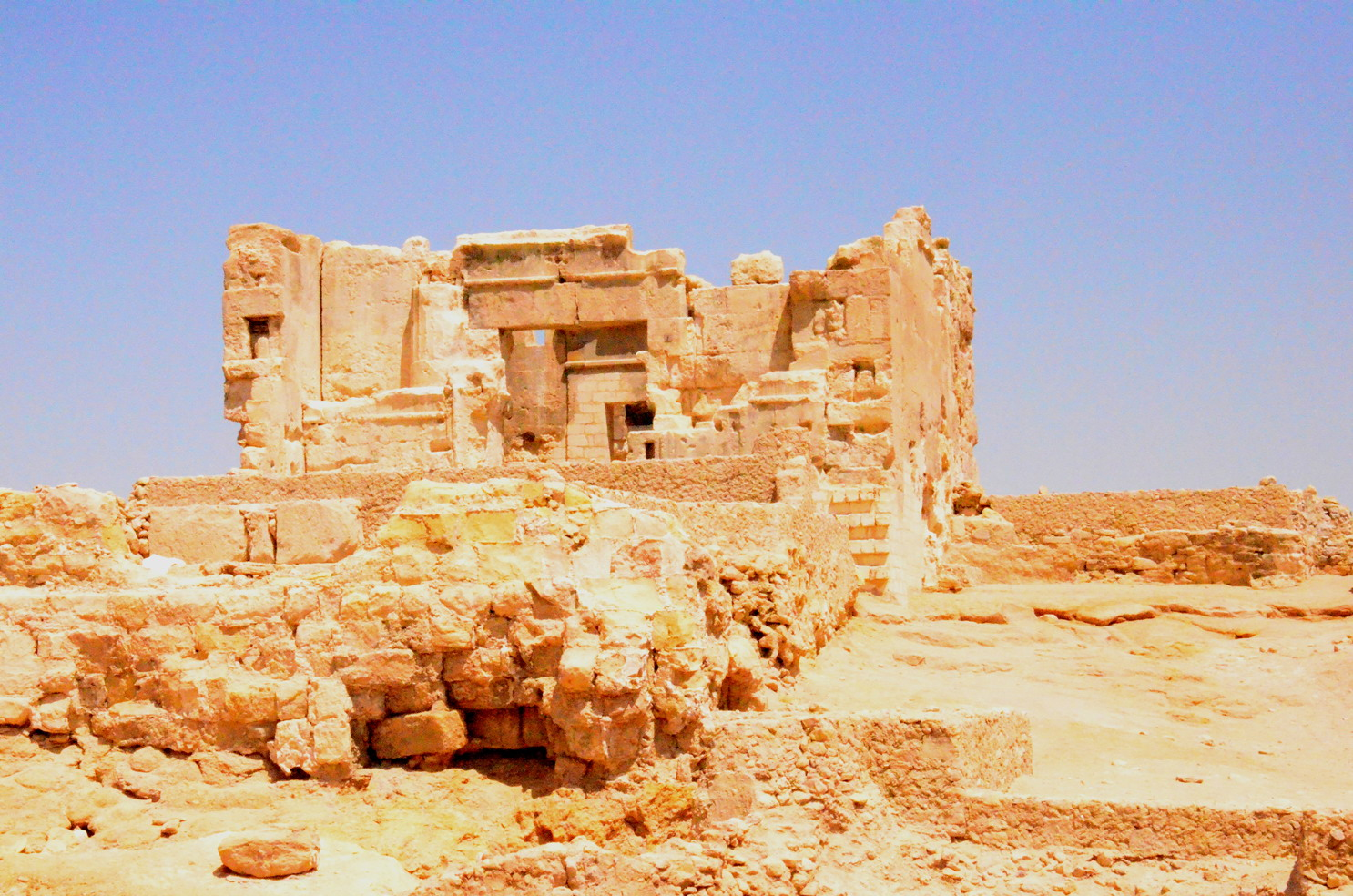 dedans le temple d'oracle